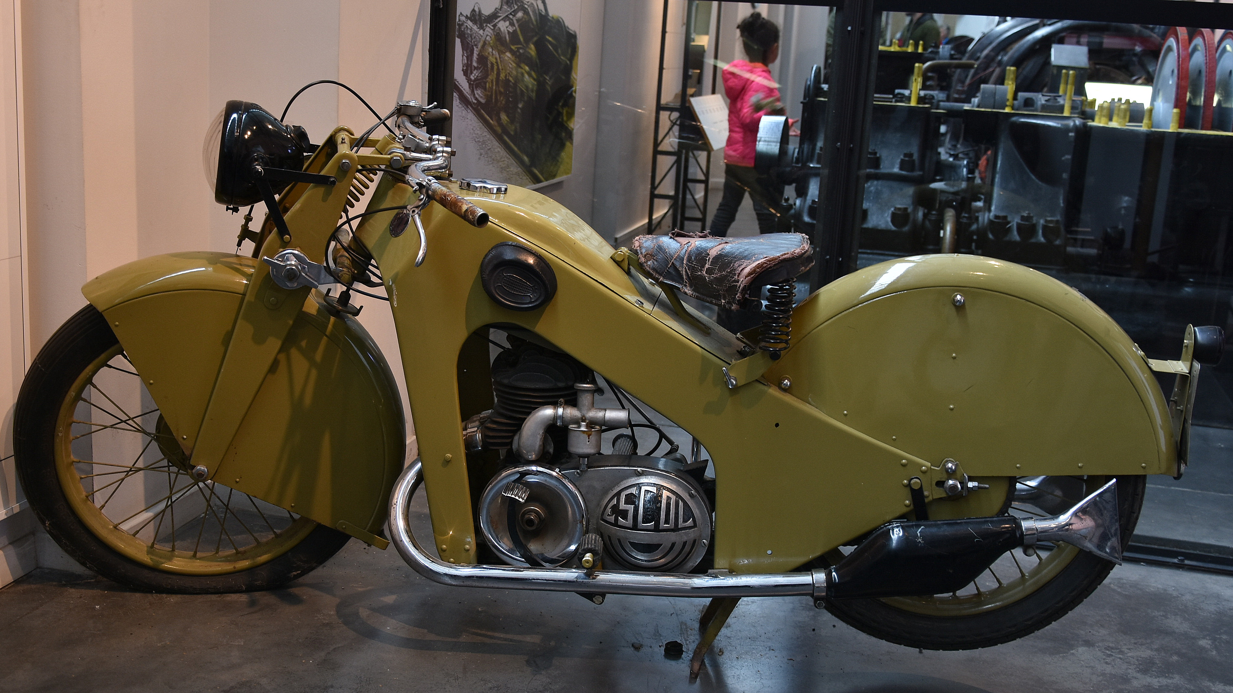 Escol - Bois du Cazier - Marcinelle 7-10-2018 This photo of movable heritage has been taken in the Walloon Region